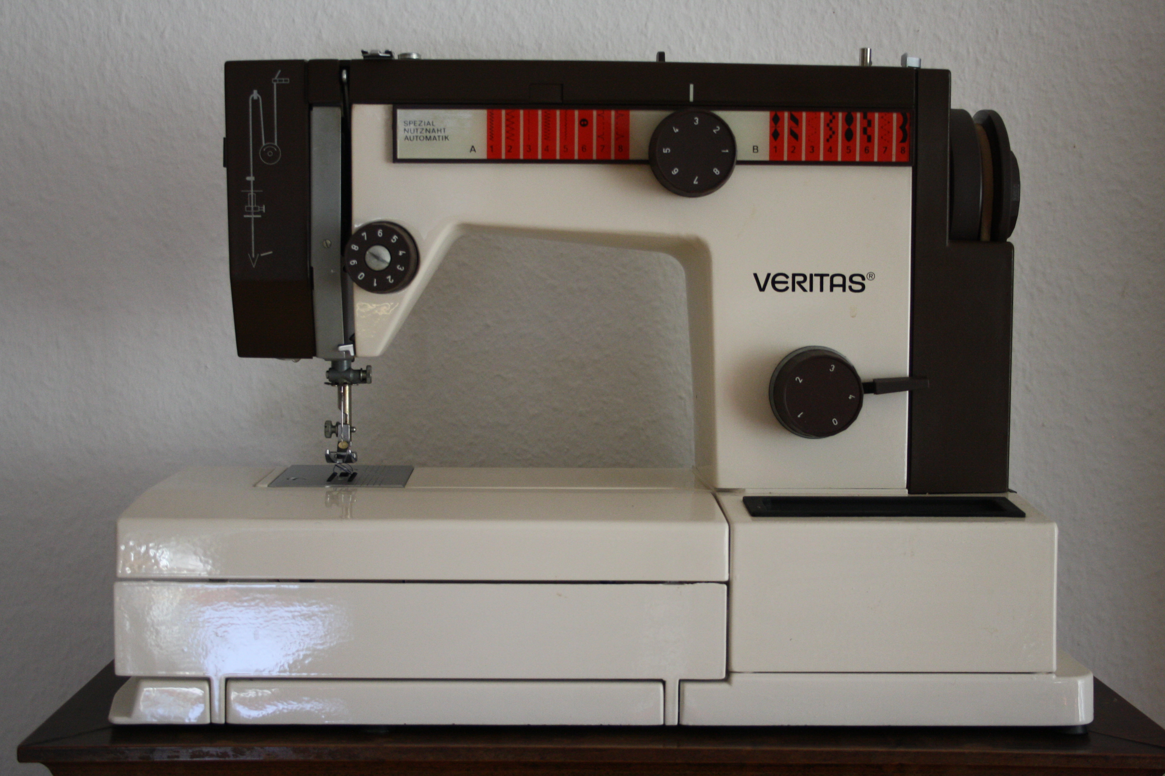 Haushaltnähmaschine 8014/4431, DDR, ca. 1985